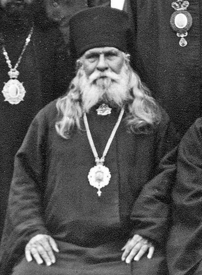 Архиепископ Геормоген (Максимов) на Архиерейском соборе РПЦЗ. 1934